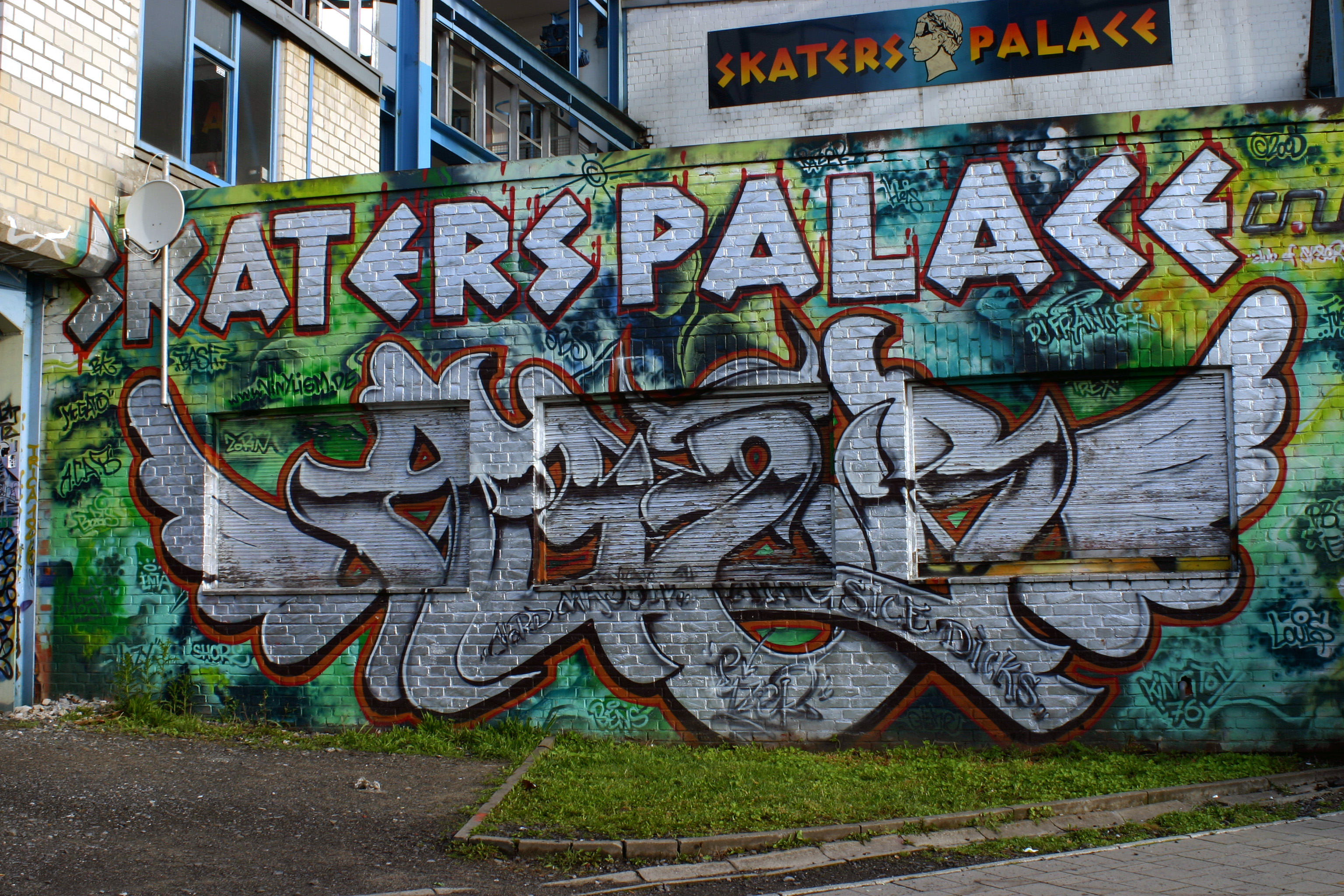 Graffiti am Scaters Palace